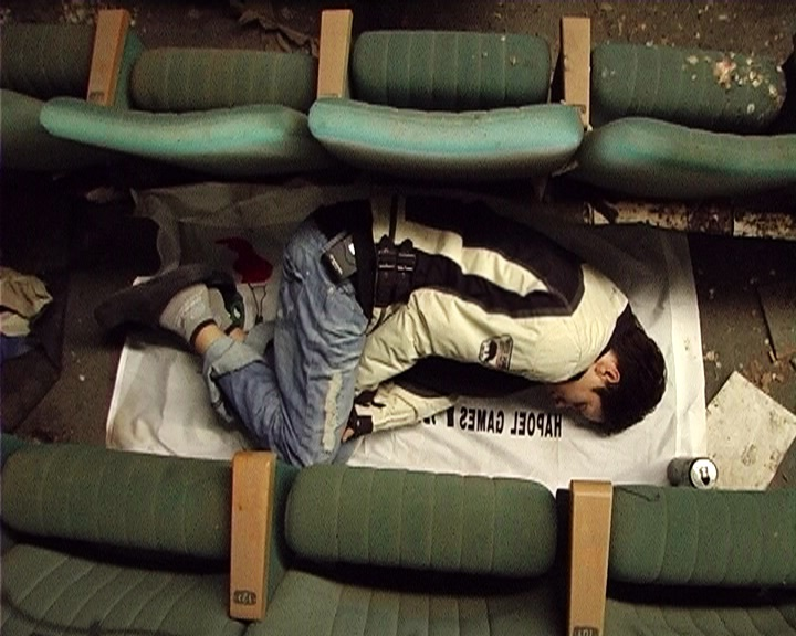 ליהן מתוך הסרט "בדרך למעלה"